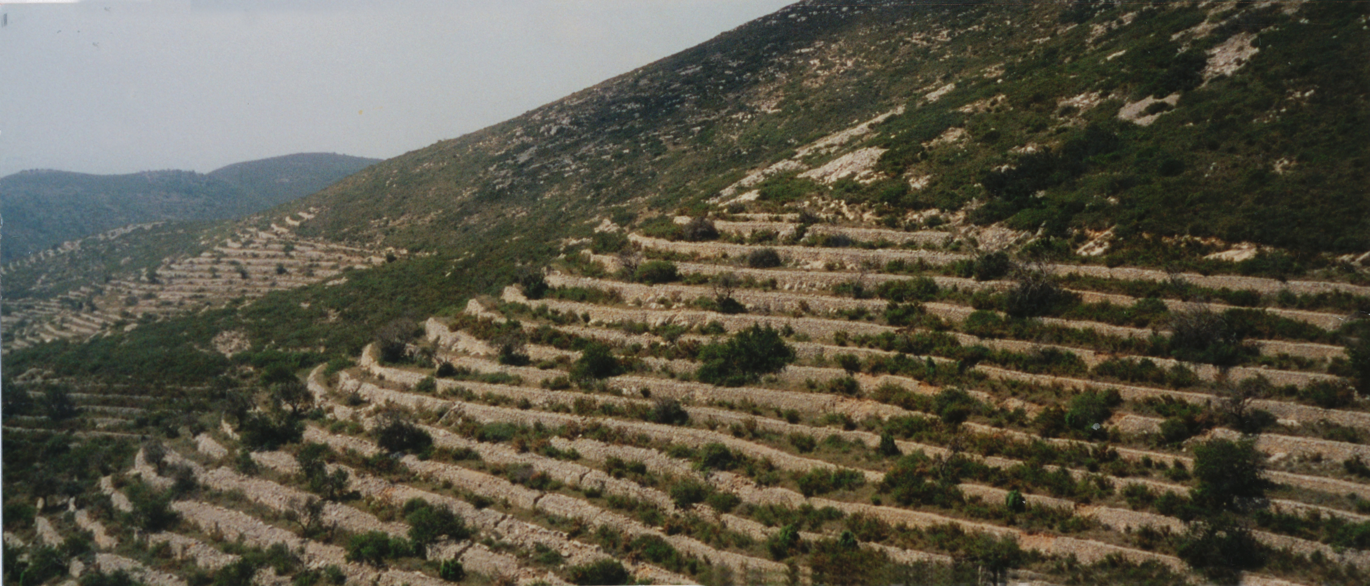 Peñiscola - anciennes cultures en terrasses.